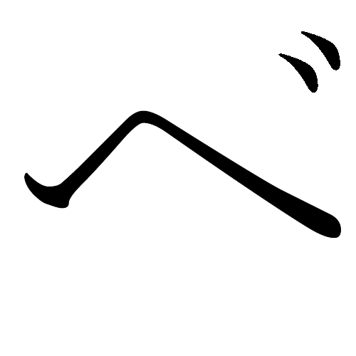 Japanese Katakana "Be"